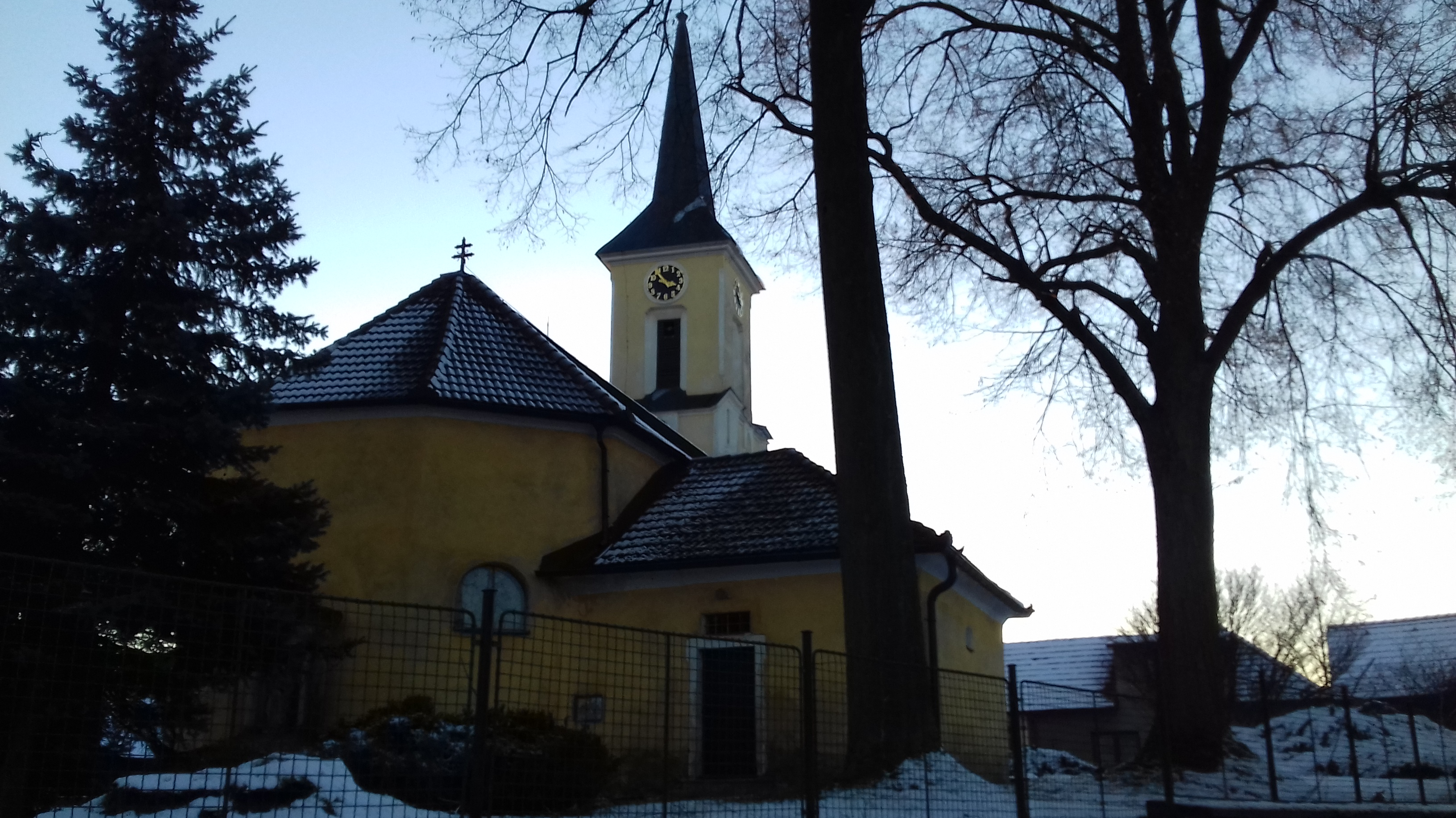 Barokní kostel svatého Petra a Pavla, Libkova Voda